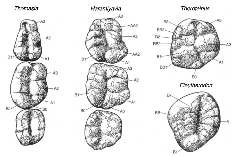 Left upper molariforms of allotherians. Cusps are numbered from distal to mesial to show postulated homologies with Haramiyavia. In Eleutherodon BB and Bx are enlarged mesial cusps of the lingual (BB) and middle (B) rows, and A indicates the Arow. Thomasia after Sigogneau-Russell(1989) ('Haramiya I, IZ'); Haramiyavia after Jenkins et al. (1997); Theroteinus, SNP 78 W, from a cast; Eleutherodon, BDUC J.460.